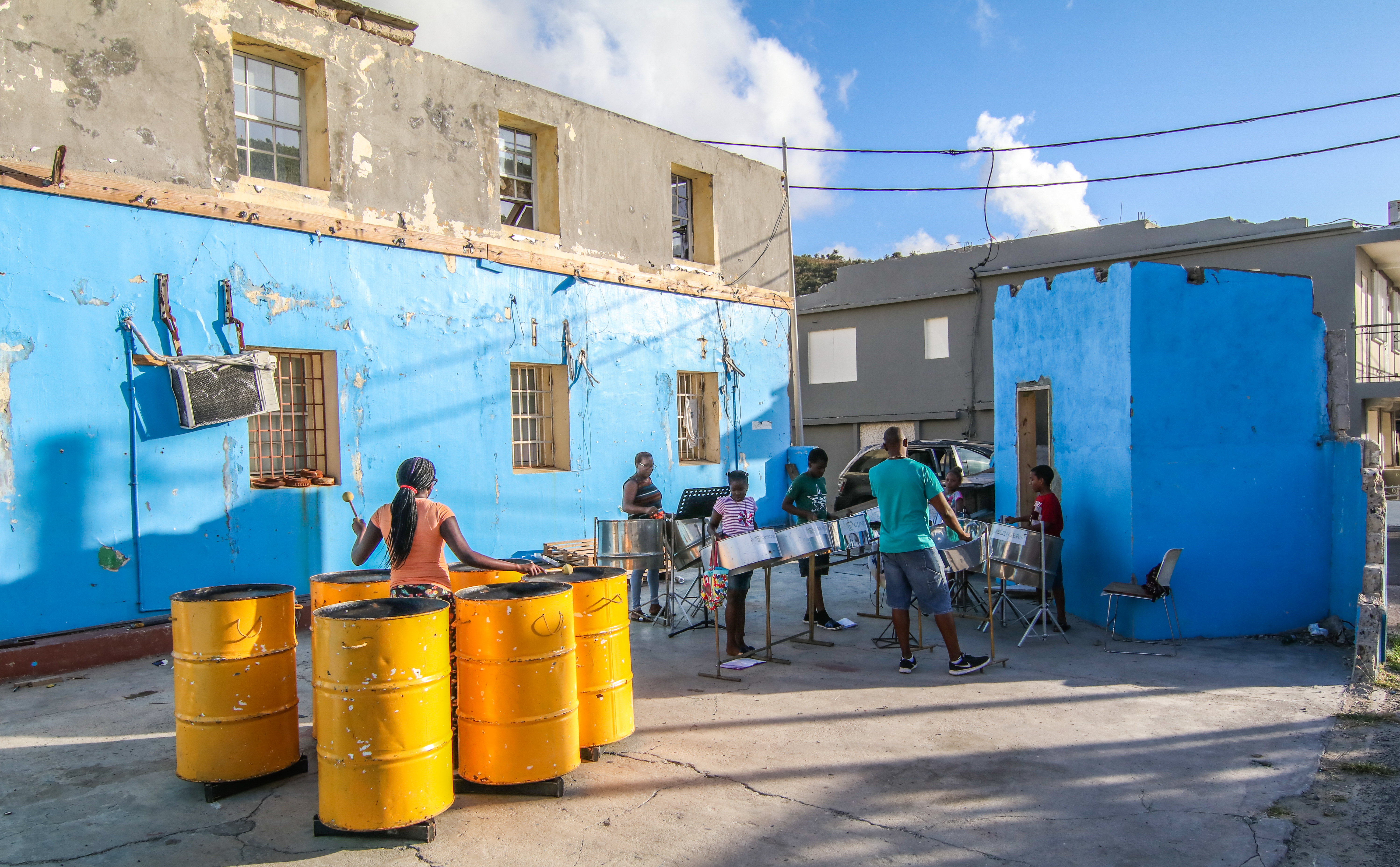 L'ouragan Irma a emporté la toiture de la maison qui abritait jadis les joueurs de steel-pan. Un instrument créé à Trinidad dans les années 1940 pour accompagner les processions lors des carnavals.